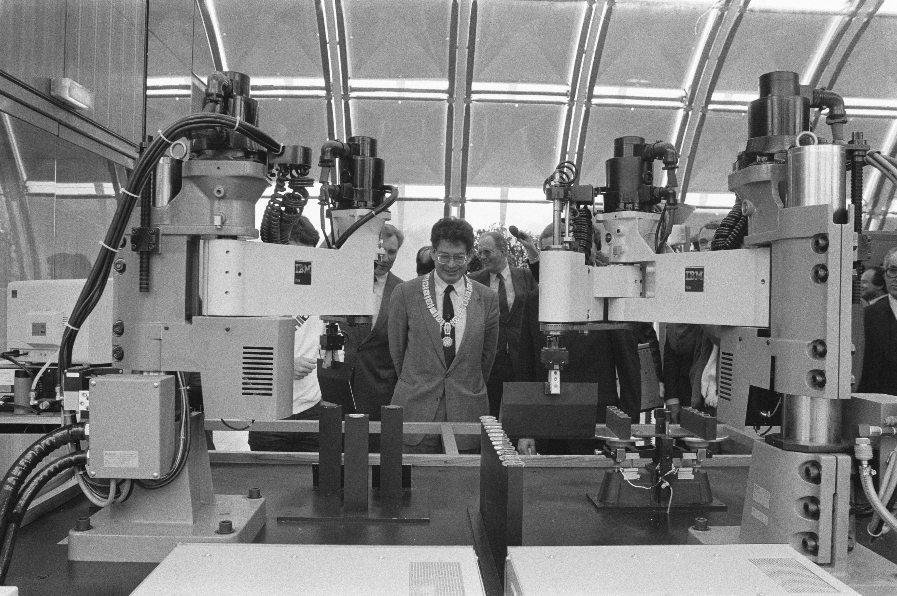 Collectie / Archief : Fotocollectie Anefo Reportage / Serie : [ onbekend ] Beschrijving : Burgemeester Van Thijn opent computerexpositite EXHIBIT voor jongeren; burgemeester Van Thijn bij een robot Datum : 9 april 1985 Trefwoorden : burgemeesters, openingen, robots Fotograaf : Vollebregt, Sjakkelien / Anefo Auteursrechthebbende : Nationaal Archief Materiaalsoort : Negatief (zwart/wit) Nummer archiefinventaris : bekijk toegang 2.24.01.05 Bestanddeelnummer : 933-2886